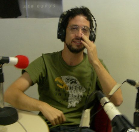 Gilad Kahane